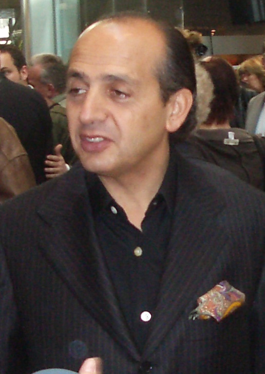 Architekt Hadi Teherani anlässlich der Eröffnung der Europapassage in Hamburg.